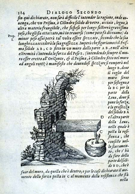 Ein von einer äusseren Last belasteter Balken